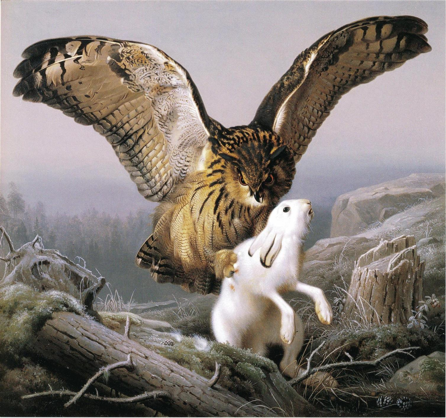 Ferdinand von Wrightin maalaus. Maalauksen omisti aikoinaan Viipurin taidemuseo, nykyään Lahden taidemuseo. Toinen versio samasta maalauksesta on Ateneumin kokoelmissa.